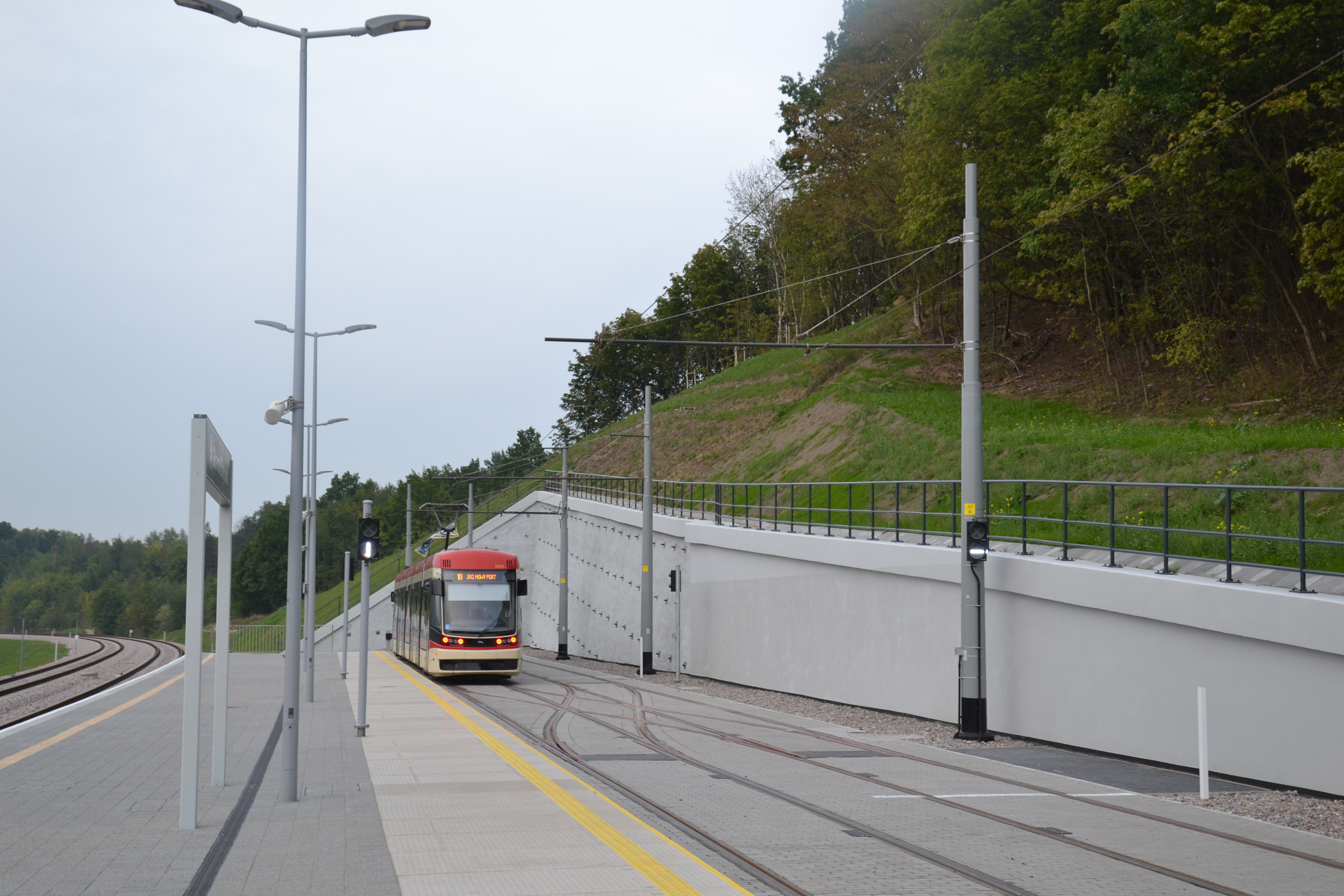 Pesa Jazz na przystanku Gdańsk Brętowo PKM This photo was taken during Railway Wikiexpedition 2015 set up by Wikimedia Polska Association in cooperation with Fundacja Grupy PKP. You can see all photographs in category Wikiekspedycja kolejowa 2015.